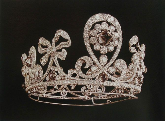 Диадема из бриллиантового гарнитура с изумрудными кабошонами. Около 1900 г.